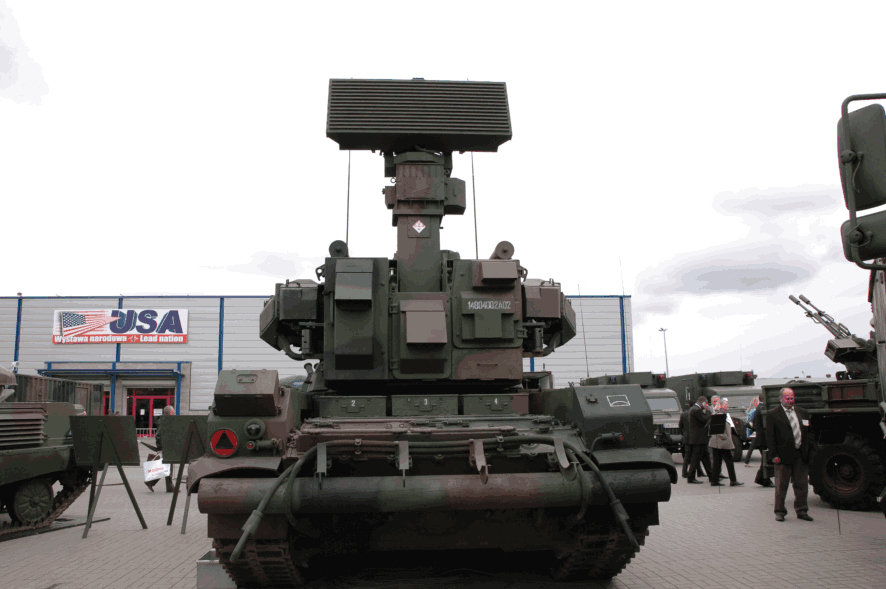 PZA LOARA na wystawie w Kielcach, wrzesień 2007, widok od tyłu